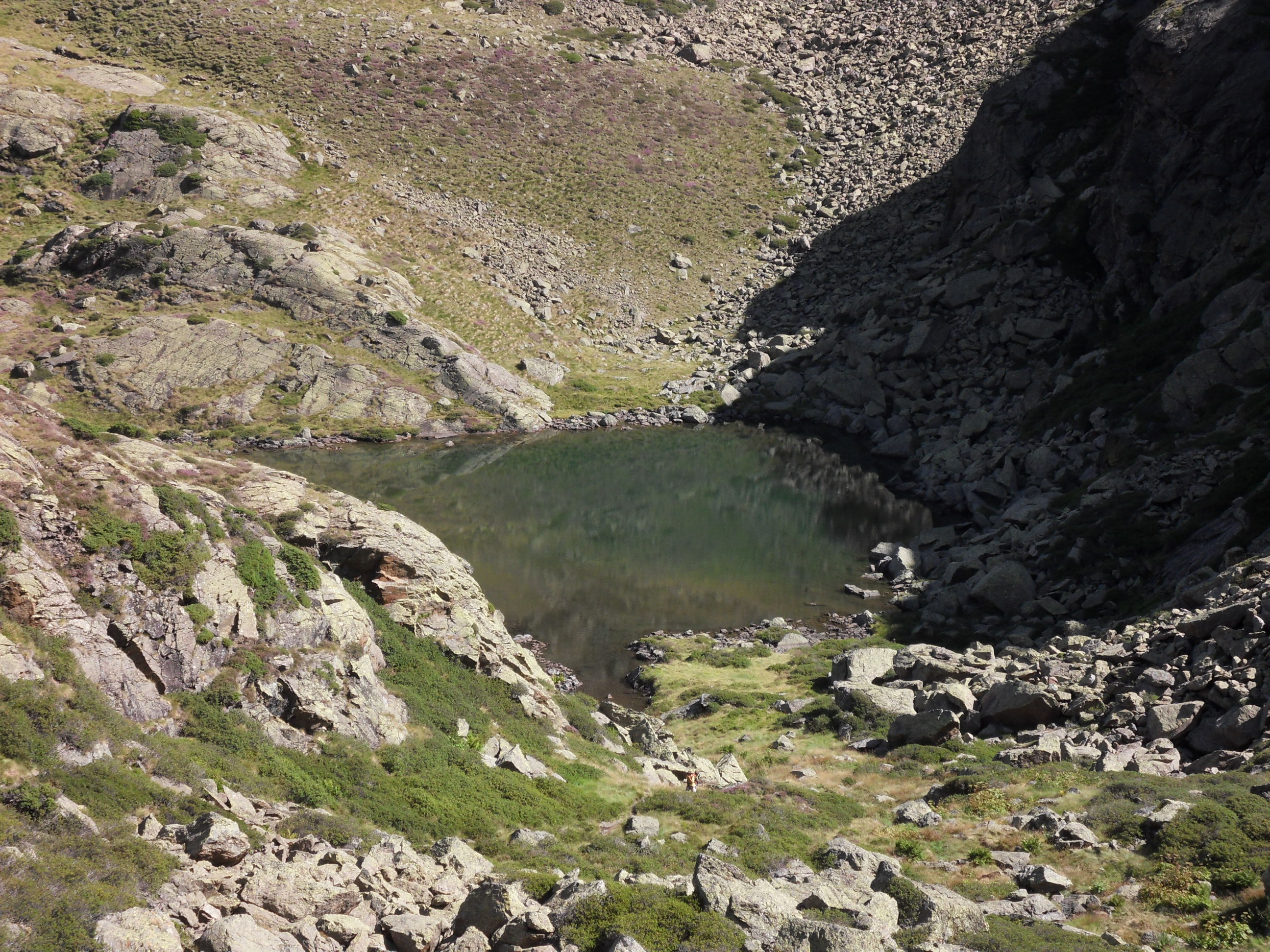 Second étang du Picot 2163m